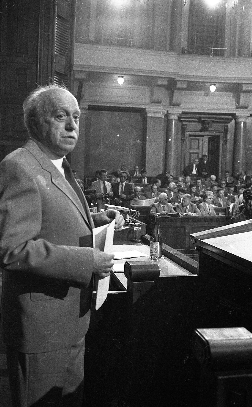 Митја Рибичич (1919-2013), југословенски и словеначки политичар.фото:Стеван Крагујевић (по одобрењу кћерке Тање Крагујевић)